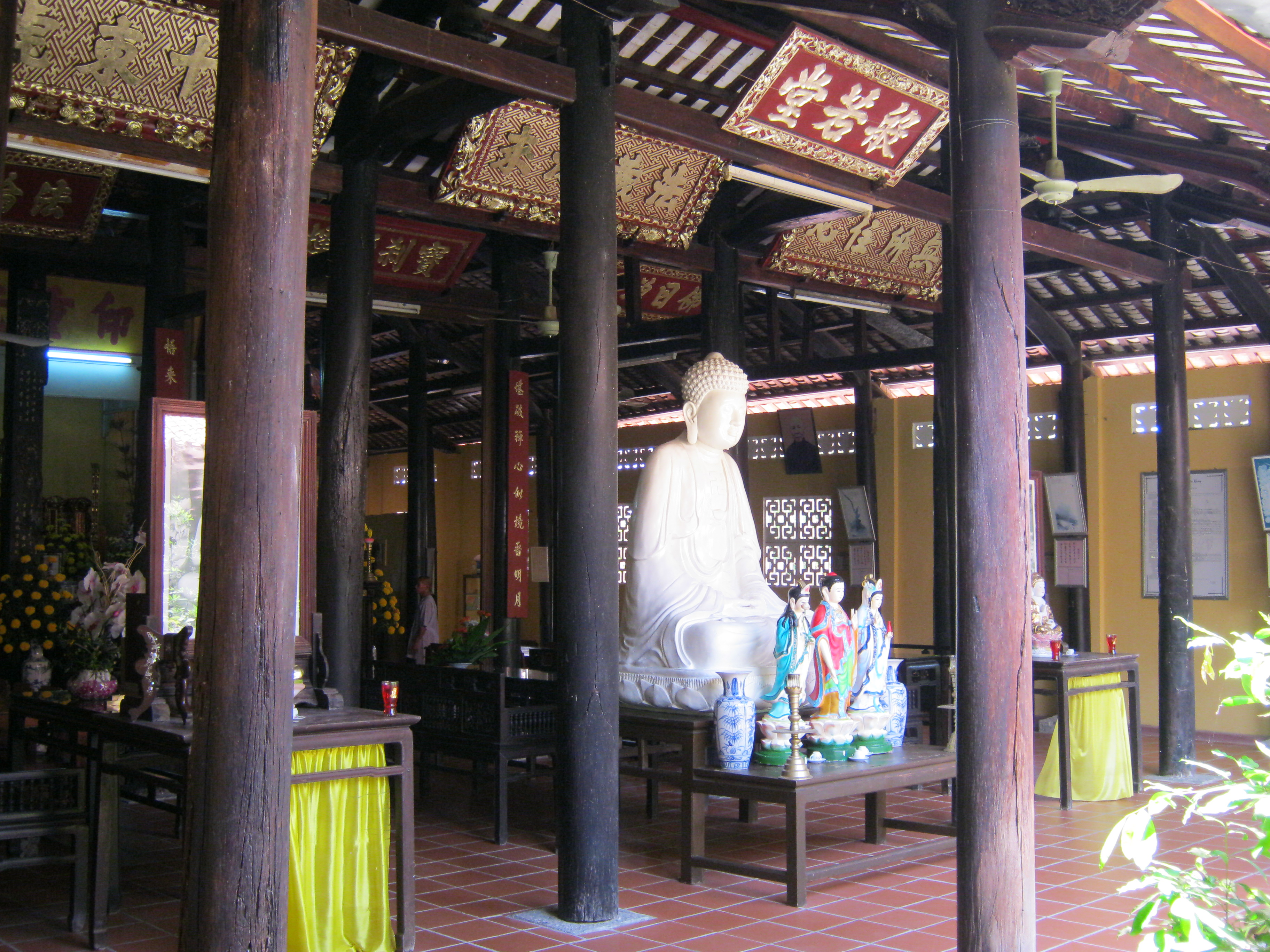 Nhà Hậu Tổ chùa Bửu Hưng ở Long Thắng, Lai Vung, Đồng Tháp, Việt Nam